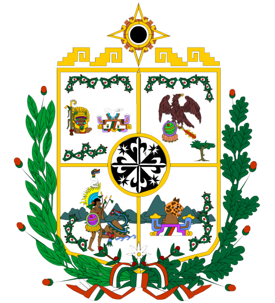 Escudo de la Ciudad de Miahuatlan de Porfirio Diaz Oaxaca